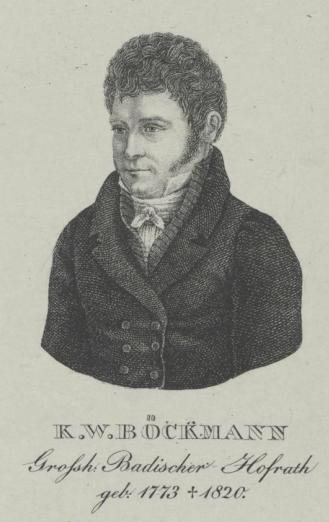 Karl Wilhelm Böckmann (* 1. Oktober 1773 in Karlsruhe; † 18. Juni 1820 ebenda)